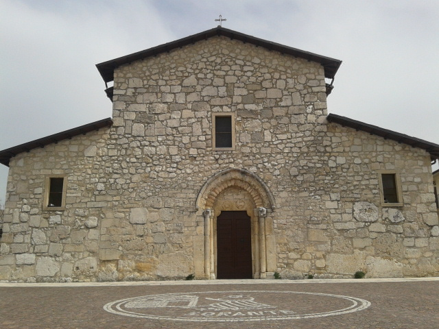 Facciata del santuario